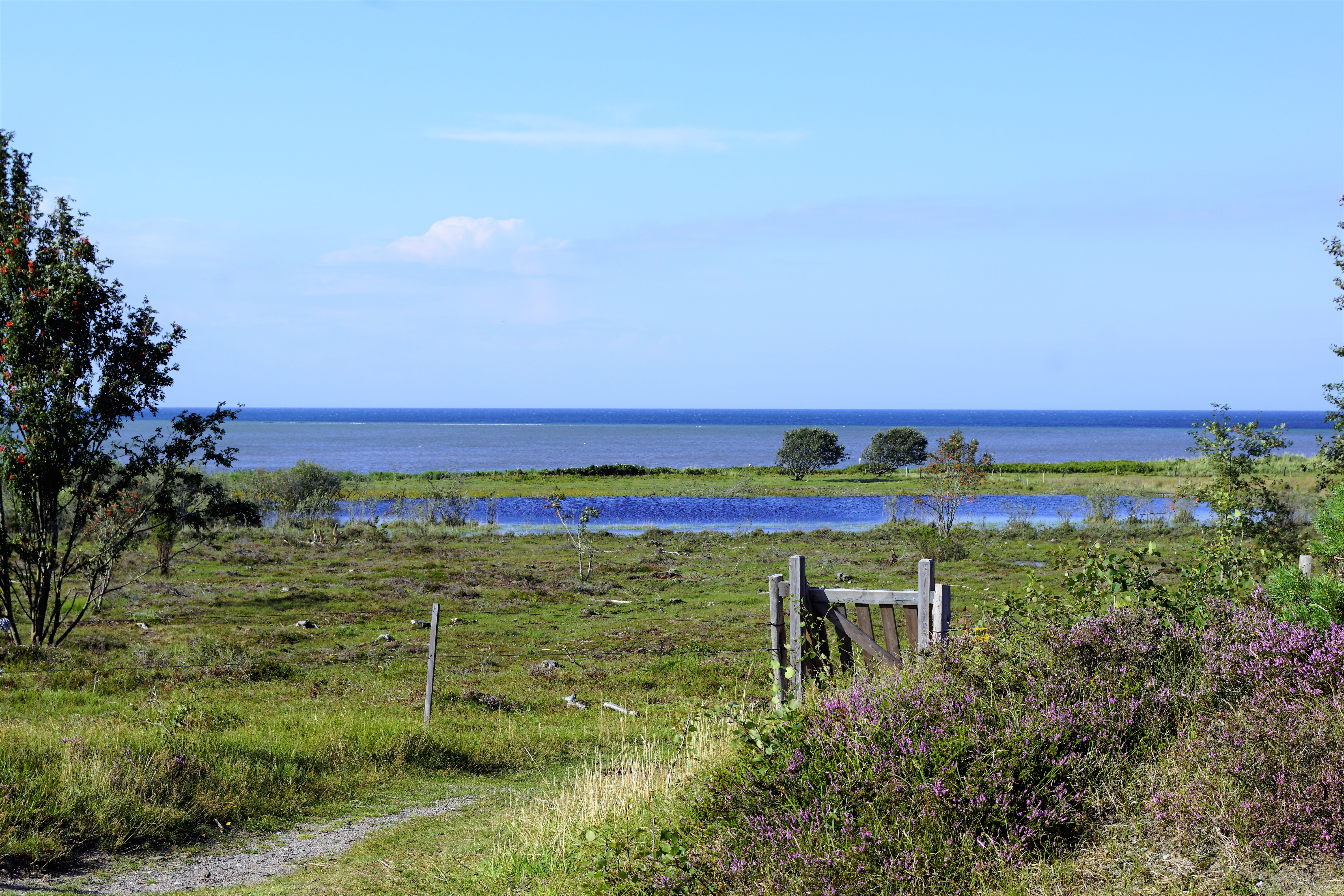 Holtemmen, set mod nord. Farveskiftet i havet er Rønnerev, der går helt ud til Nordre Rønner